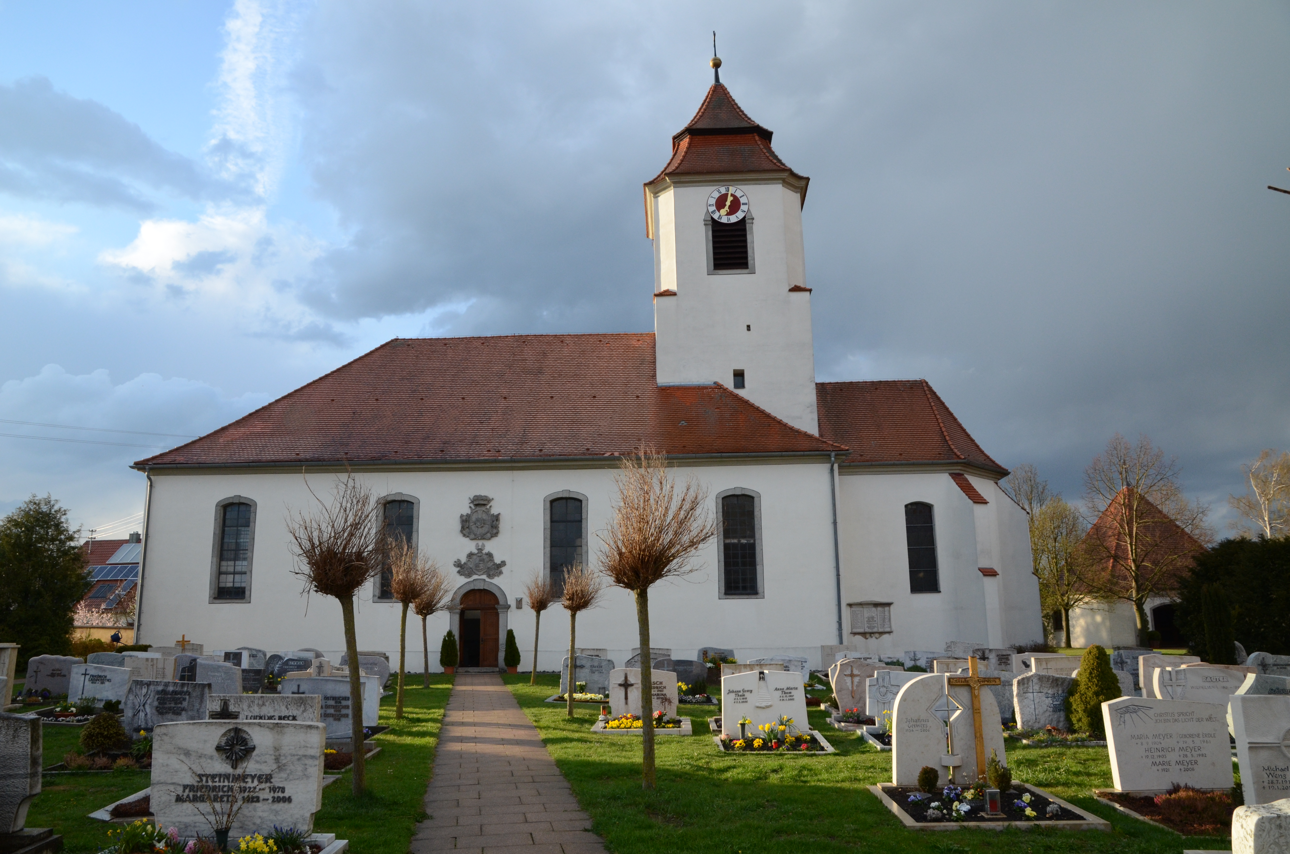 evang.-luth. Kirche St. Georg in Möttingen